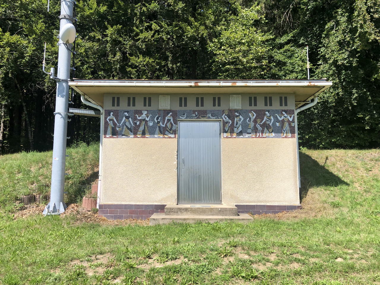 Mosaiken von Hans Daucher (Kunstpädagoge)